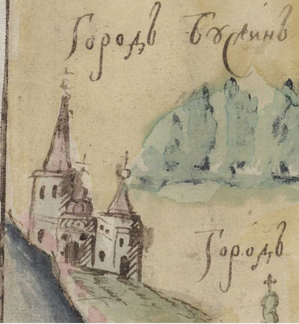 Фрагмент карти Київської губернії. XVIII століття. РГАДА, ф. 192, оп. 1, Киевская губ., № 5.